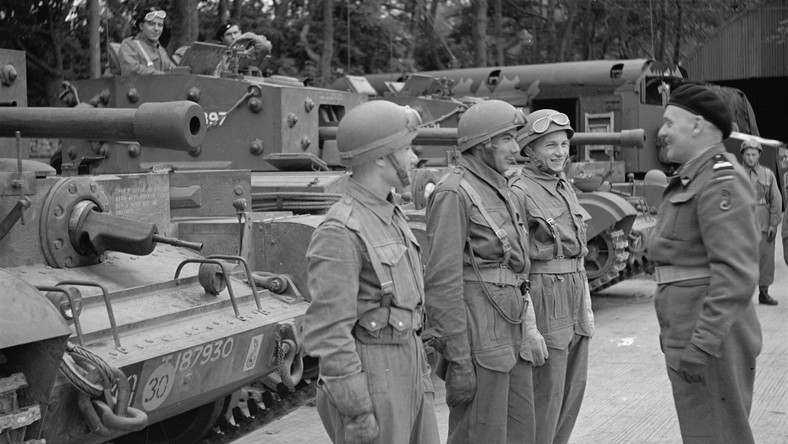 Dowódca I Dywizji Pancernej Wojska Polskiego generał Stanisław Maczek